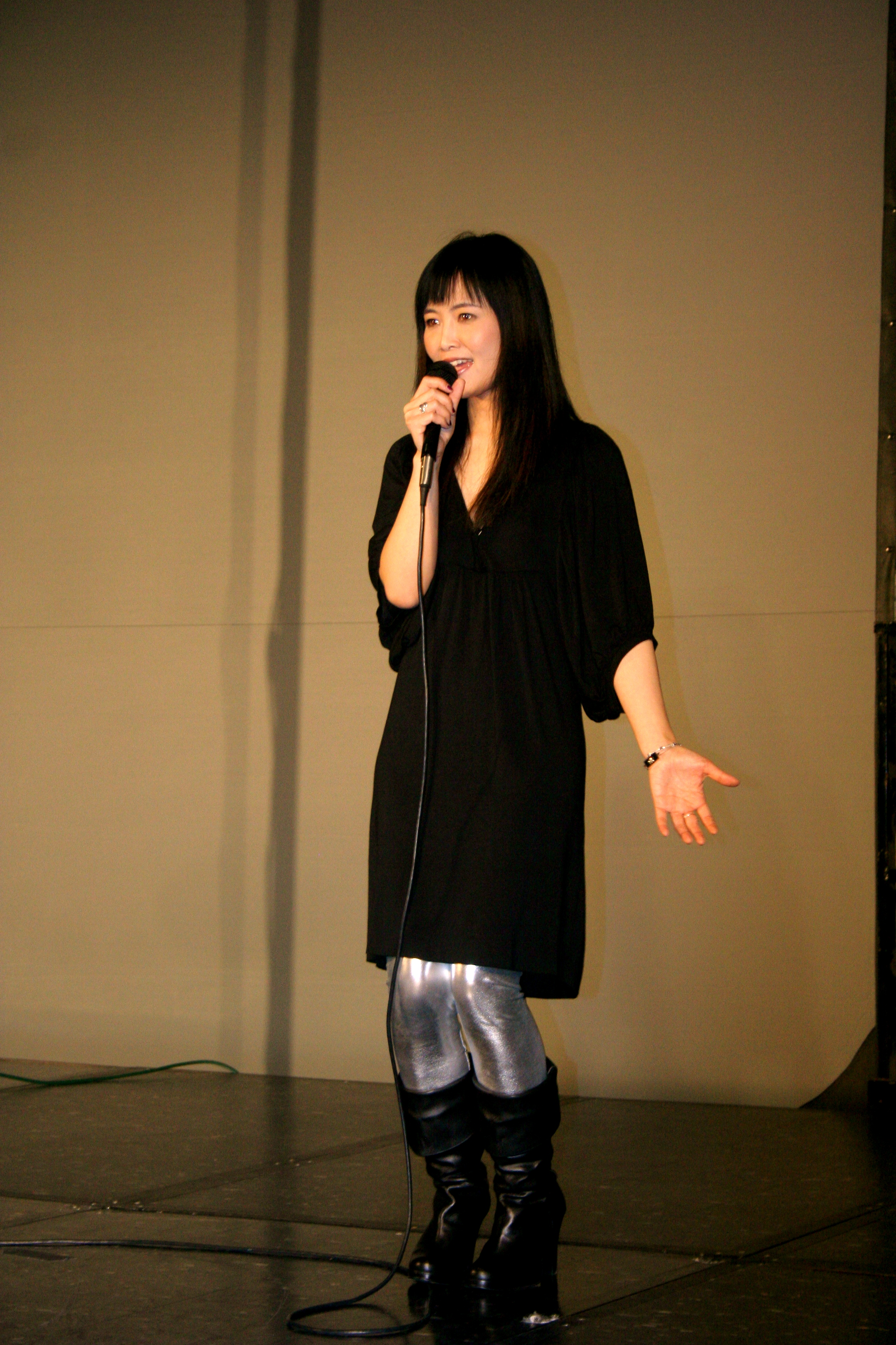 Mari Iijima at Tekkoshocon 5, April 14, 2007.